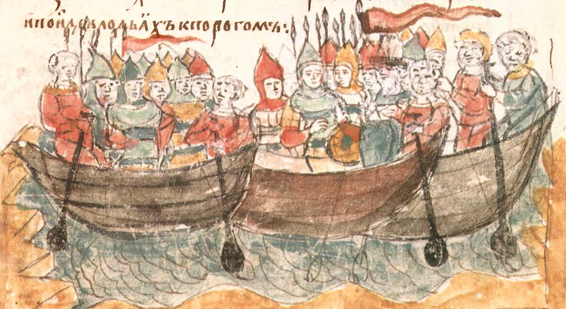 Опис події за 971 рік в Повісті временних літ: «Святослав уклав мир з греками і пішов у човнах до порогів, і сказав йому воєвода батьків, Свингельд: «Обійди, князю, обіч на конях, бо стоять печеніги в порогах». І не послухав його, і пішов на човнах».